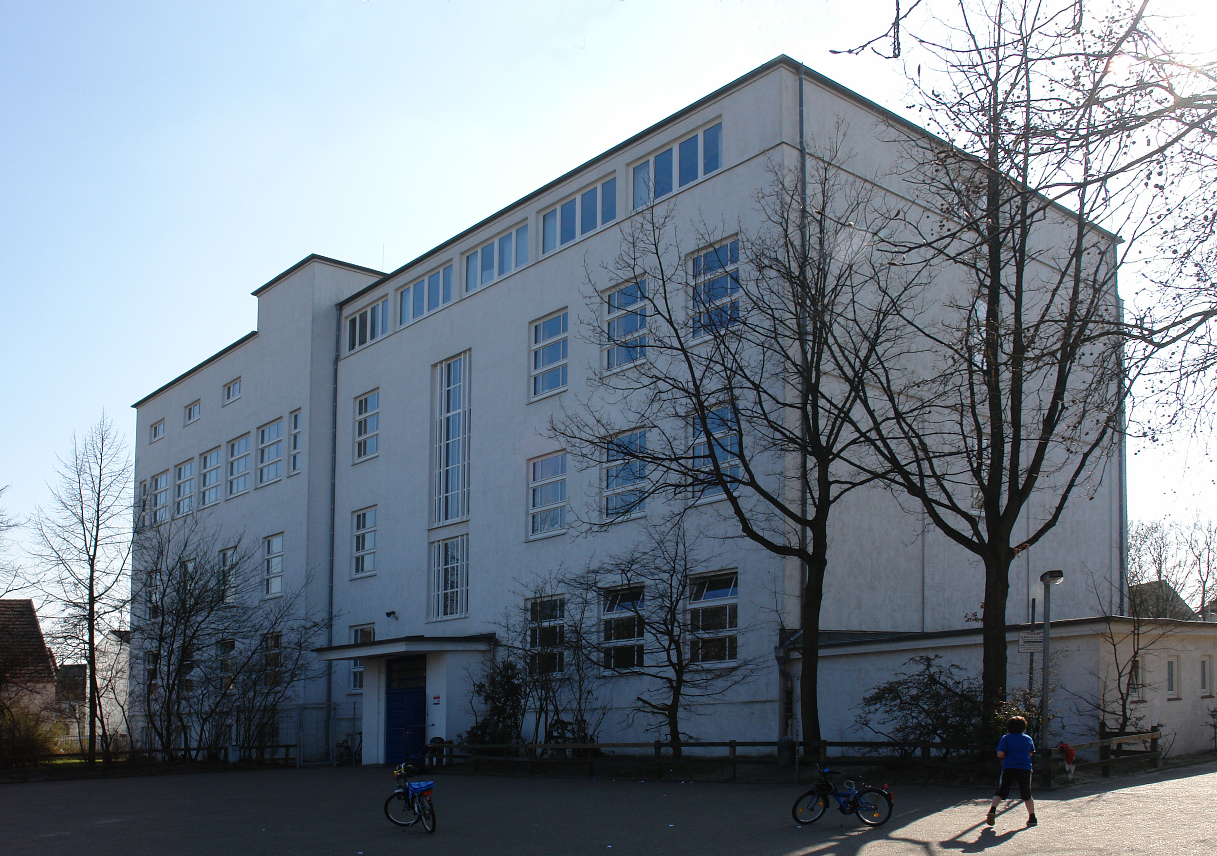 II. Evangelische Volksschule, Schule an der Brinkmannstraße in Bremen, Hemelinger Heerstraße 40Das abgebildete Objekt ist ein geschütztes Kulturdenkmal in der Freien Hansestadt Bremen, mit der Nr. 0214 beim Landesamt für Denkmalpflege registriert.